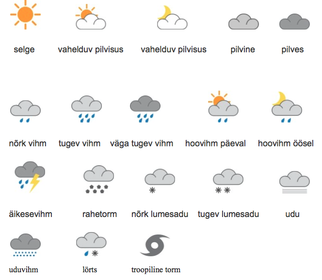 ilmanähtuste leppemärgid